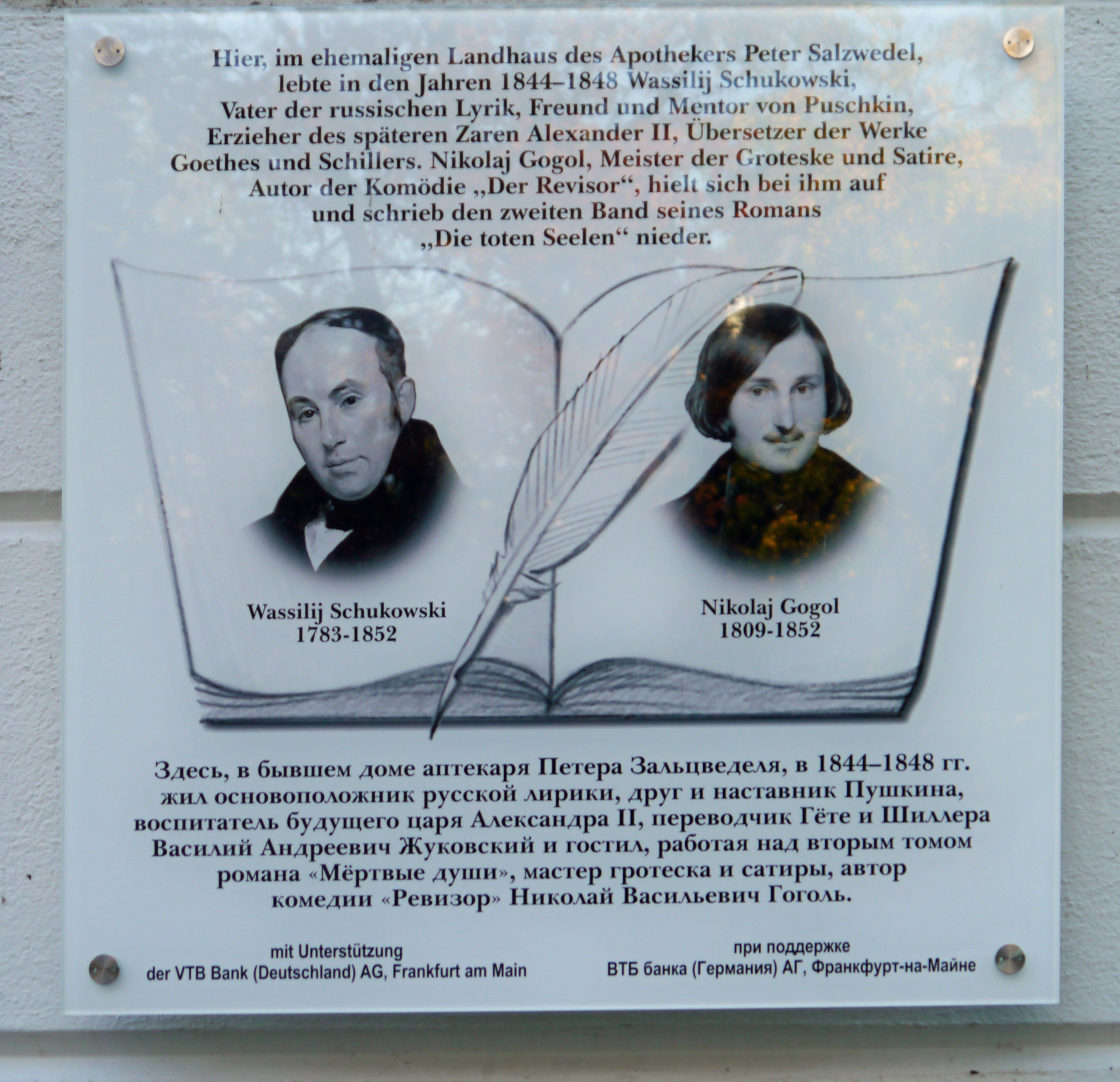 Erinnerungstafel, an den Aufenthalt von Wassilij Schukowski und Nikolaj Gogol (1844 bis 1848) an der Villa Metzler in Frankfurt am Main.